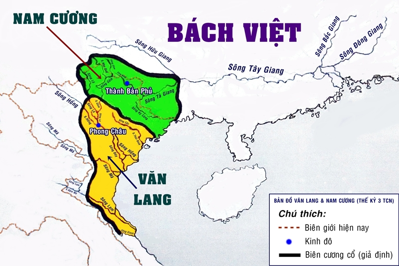 Lãnh thổ hai nước Văn Lang (trên thực tế) và Nam Cương (theo truyền thuyết) vào khoảng thế kỷ 3 TCN, sau này hợp nhất thành nước Âu Lạc: - Nước Văn Lang do các vua Hùng đứng đầu, cả nước chia thành 15 bộ - Nước Nam Cương do Thục Chế, sau đó là Thục Phán cai quản, cả nước gồm 10 xứ mường